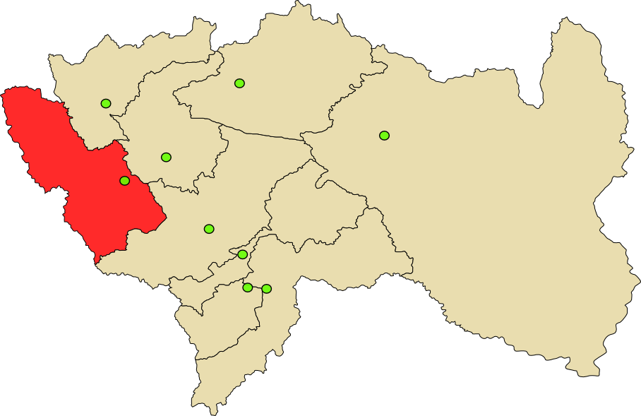 Mapa de Provincia de Yauli en Perú